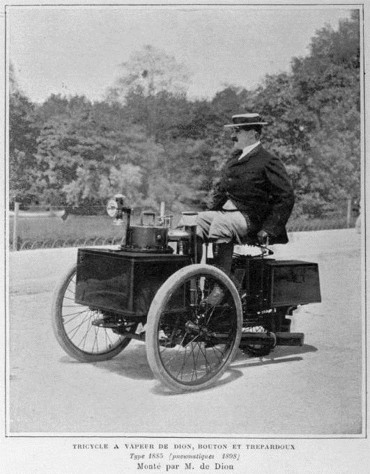 Le comte de Dion, ici en 1898.